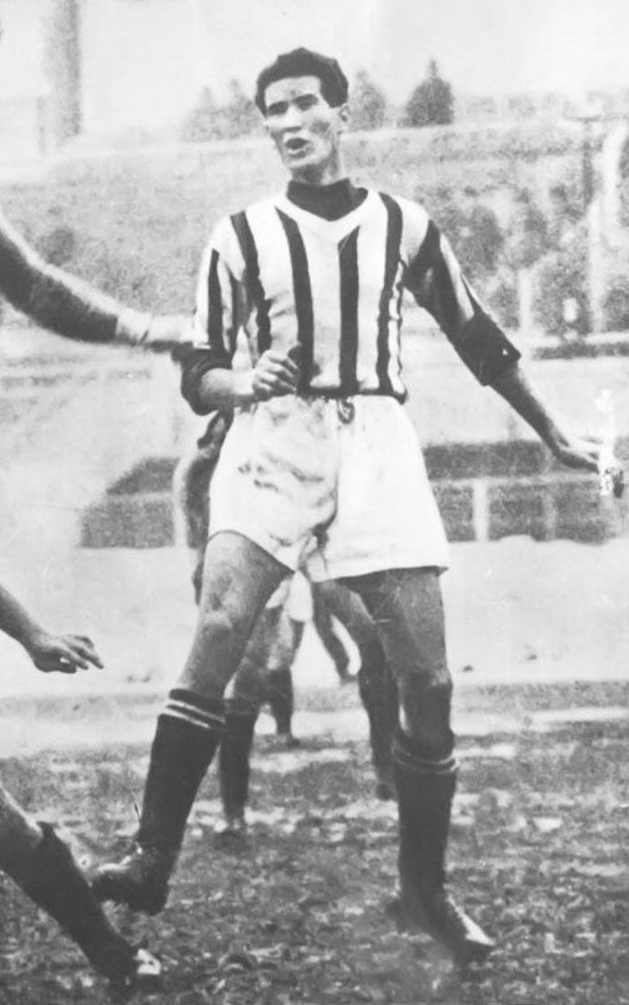 Torino, stadio Municipale Benito Mussolini, 31 gennaio 1937. Il centrocampista bianconero Giovanni Varglien (II) in azione nel corso della sfida tra Juventus e Napoli (2-0) valevole per la 18ª giornata del campionato italiano di Serie A 1936-37.